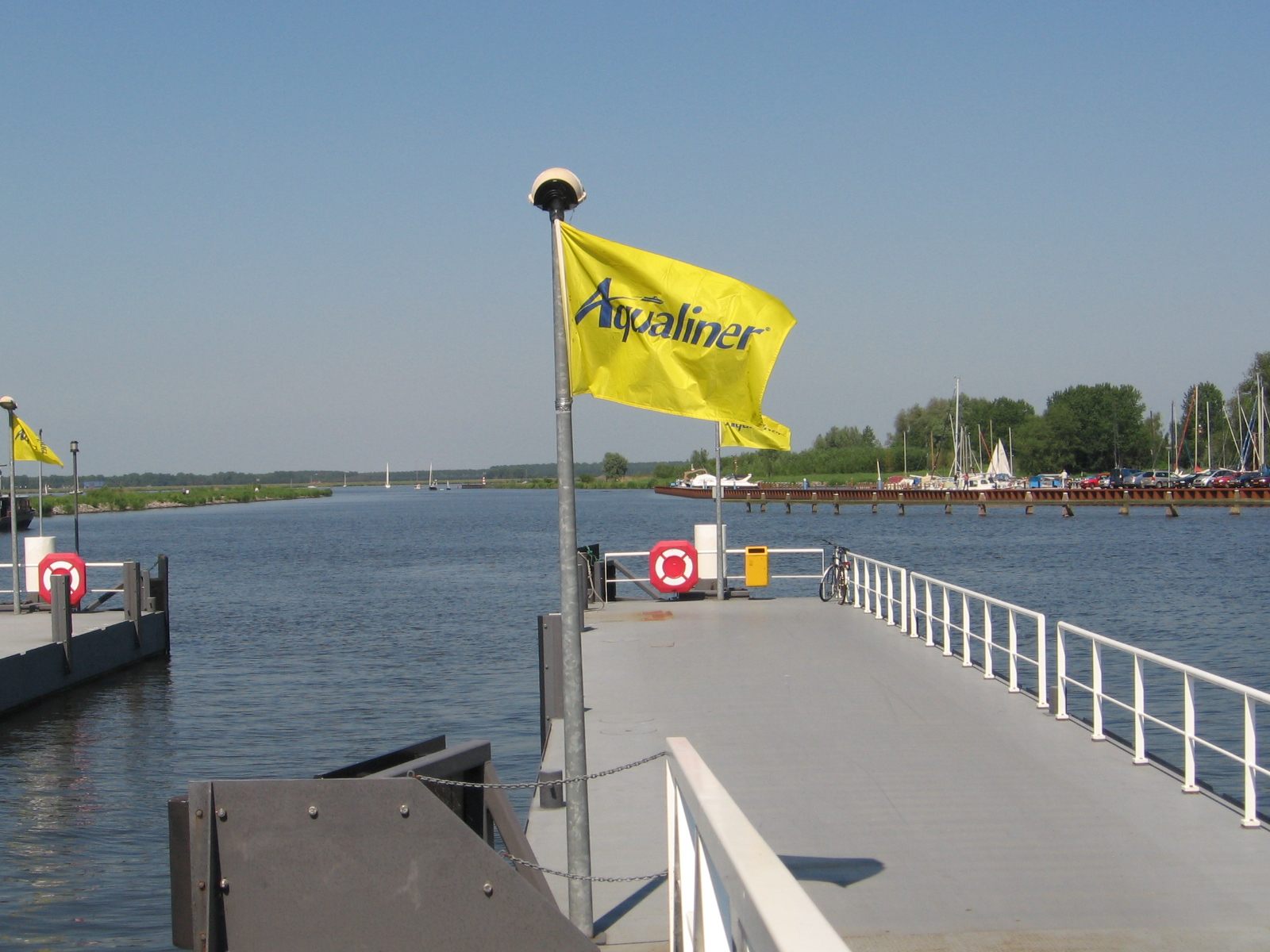 Aqualiner opstappunt, Huizen, Gooimeer, juni 2006